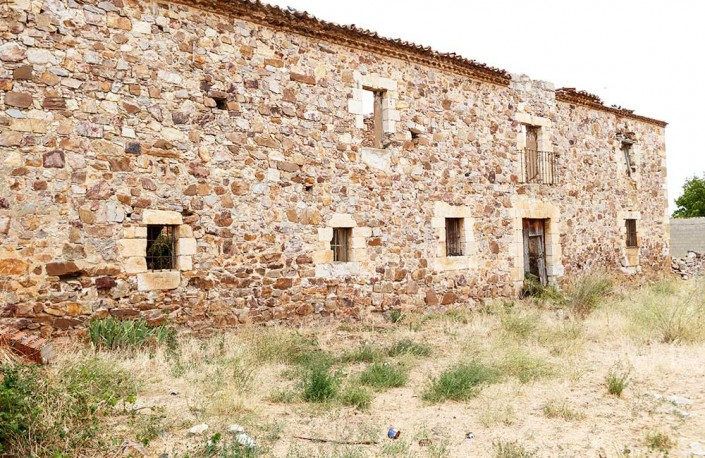 Vestigio del antiguo monasterio de los Jerónimos en Montamarta (Zamora)